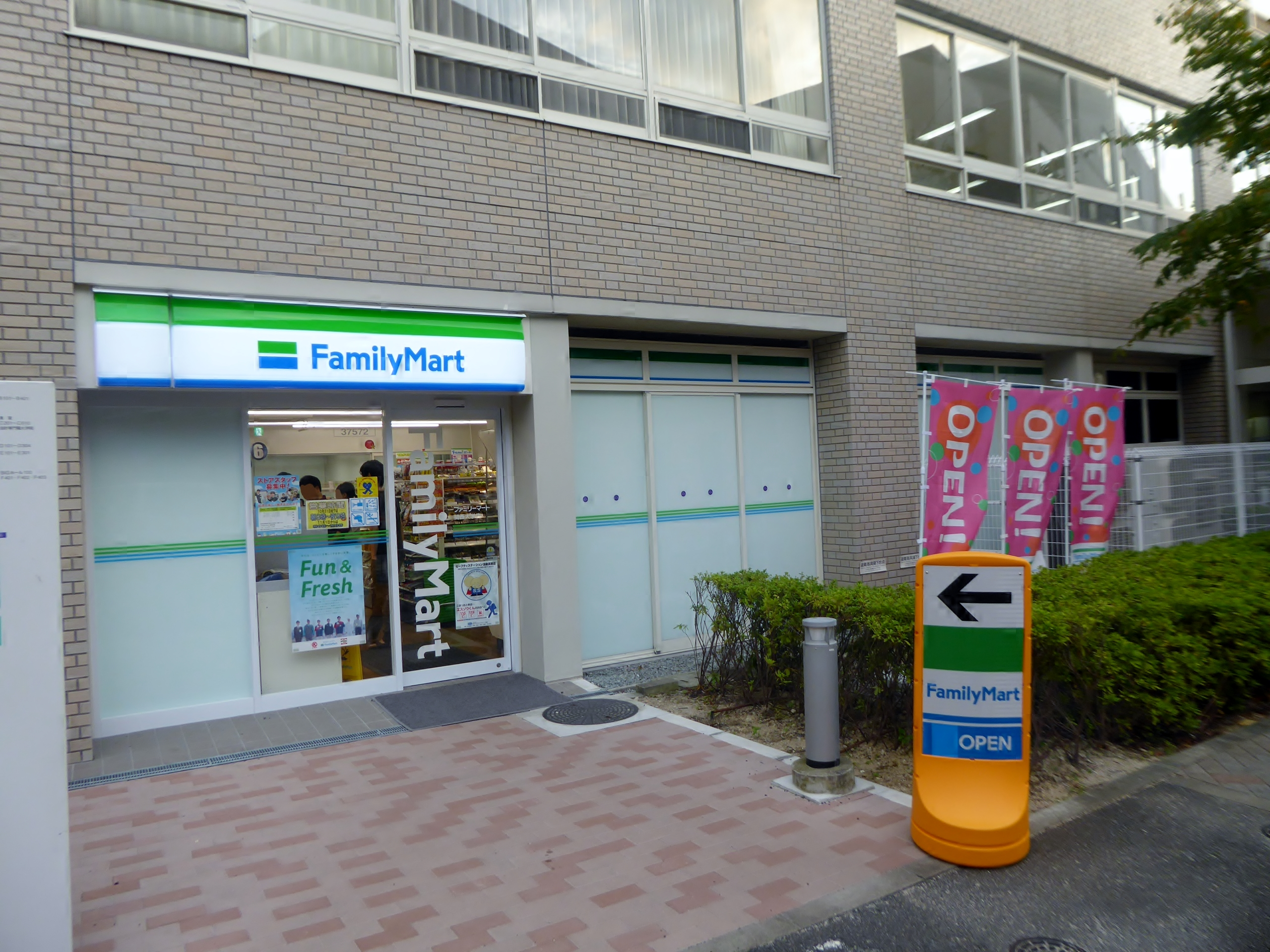 ファミリーマート関西大学店を撮影。